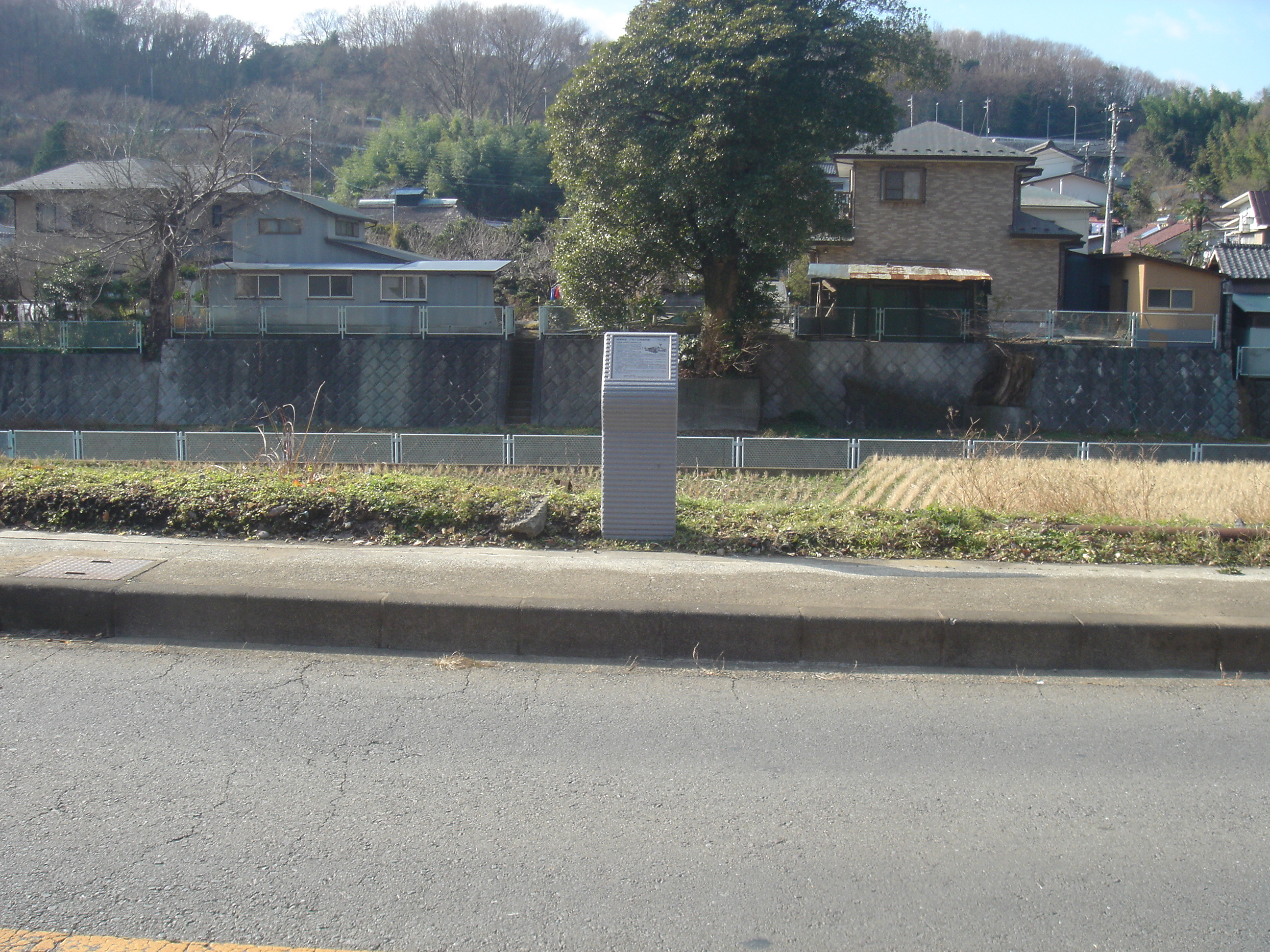 湘南軌道下井ノ口駅跡